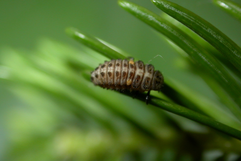 Aphidecta obliterata larva